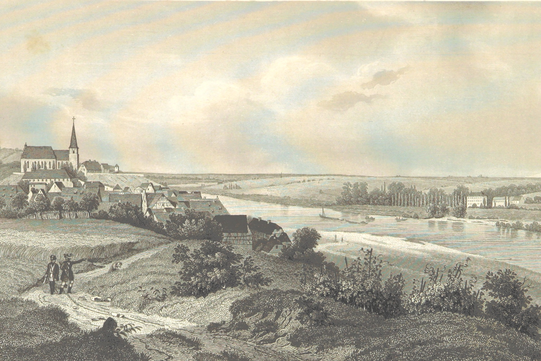 Wipfeld um 1845. Stahlstich nach Fritz Bamberger (1814-1873) aus dem Buch "Die Mainufer und ihre naechsten Umgebungen, mit 54 Stahlstichen, nach Originalzeichnungen von Fritz Bamberger nebst einer Stromkarte vom Main" von Ludwig Braunfels (Text). Erschienen in Würzburg bei Etlinger in Lieferungen von 1844 bis 1847.